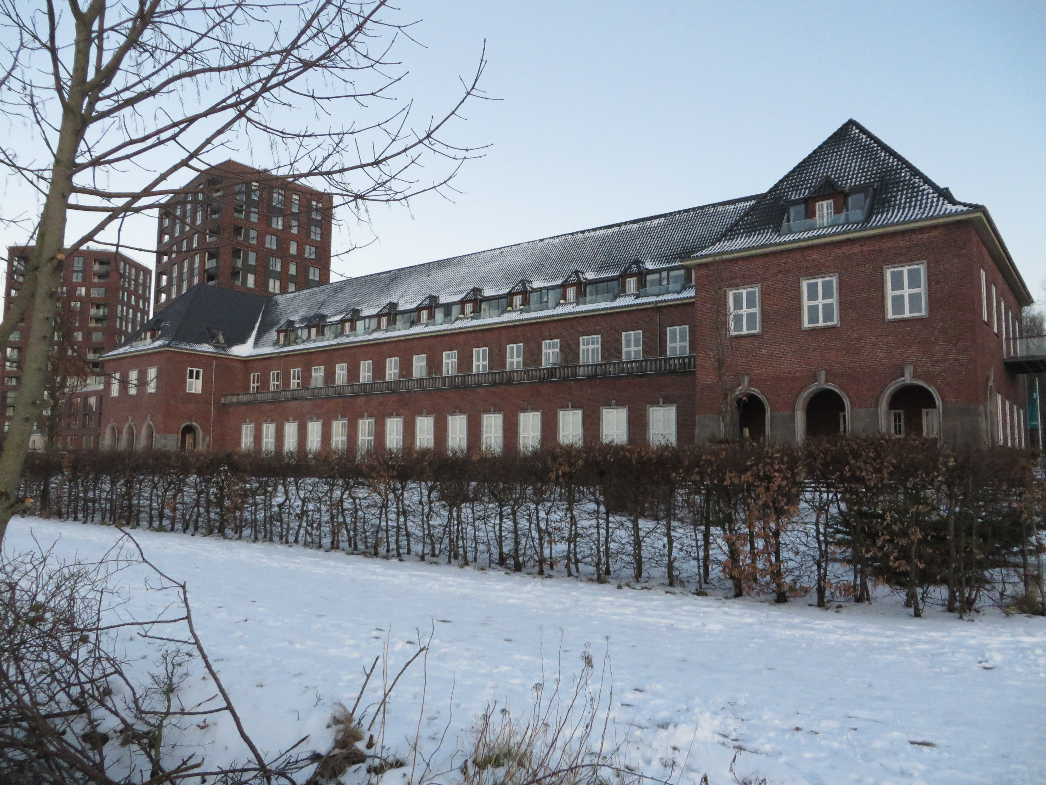 Kasinogebäude mit Lee und Luv (Mürwik Winter 2015), Bild 02